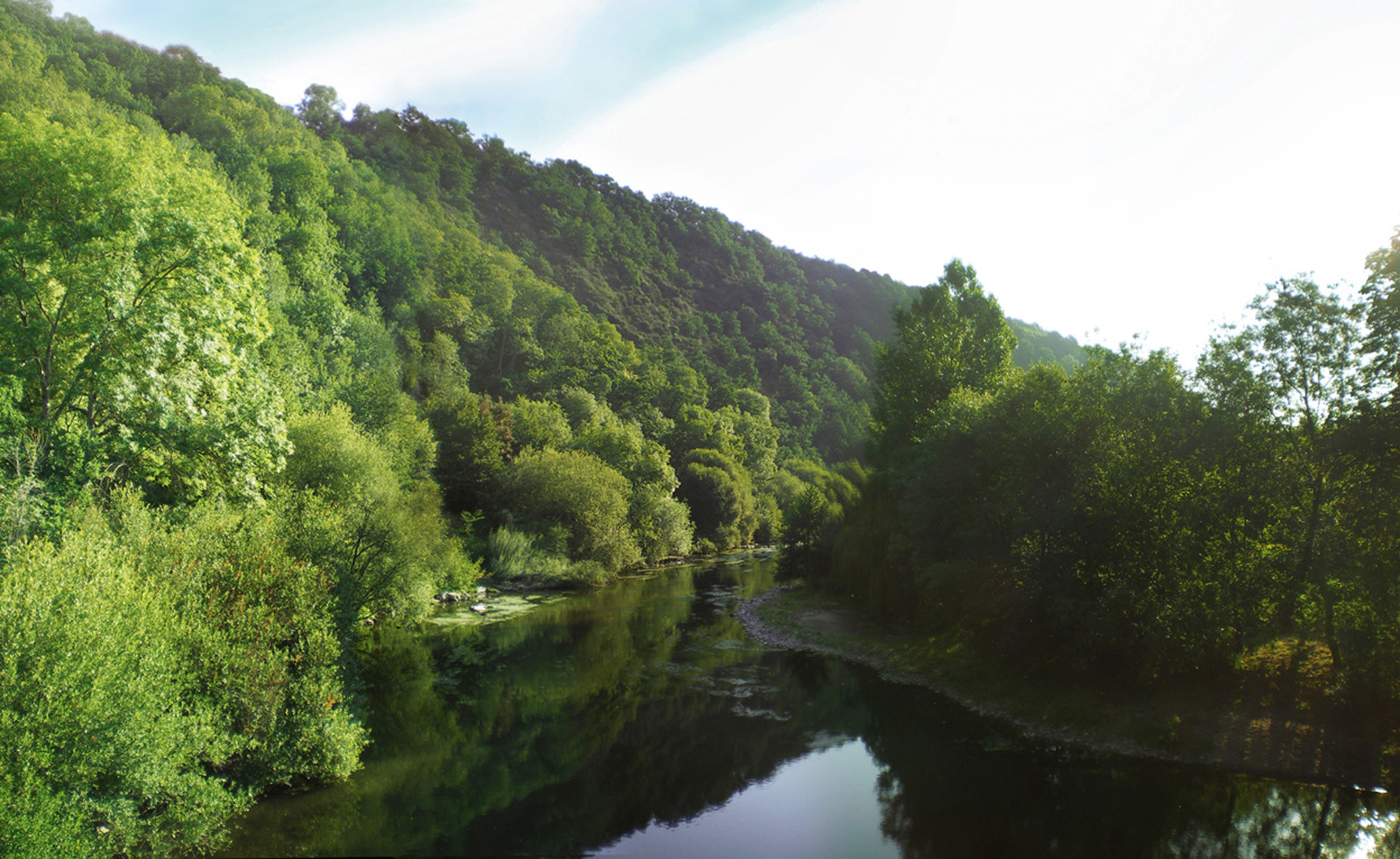 Le fleuve Orne au Pont-de-la-Mousse à Saint-Remy-sur-Orne dans le Calvados.